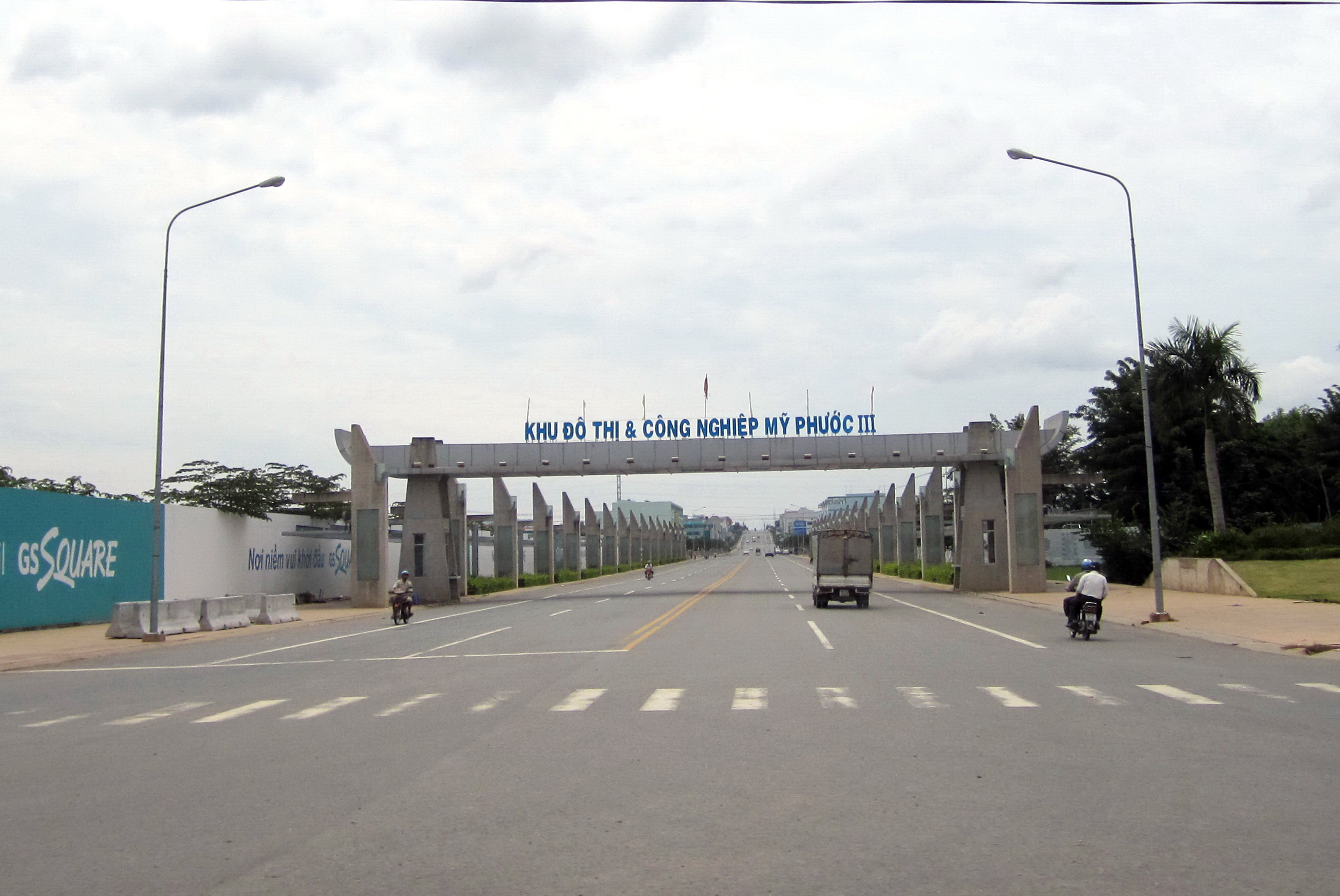 Khu Đô thị và Công Nghiệp Mỹ Phước 3